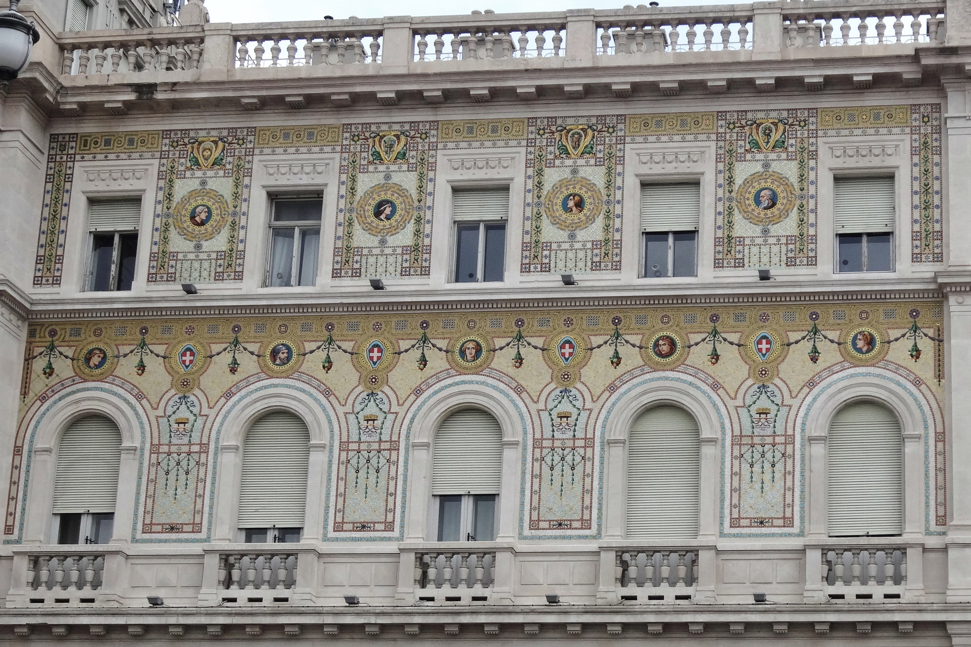 Triest, Palazzo del Governo, Teilansicht der Fassade